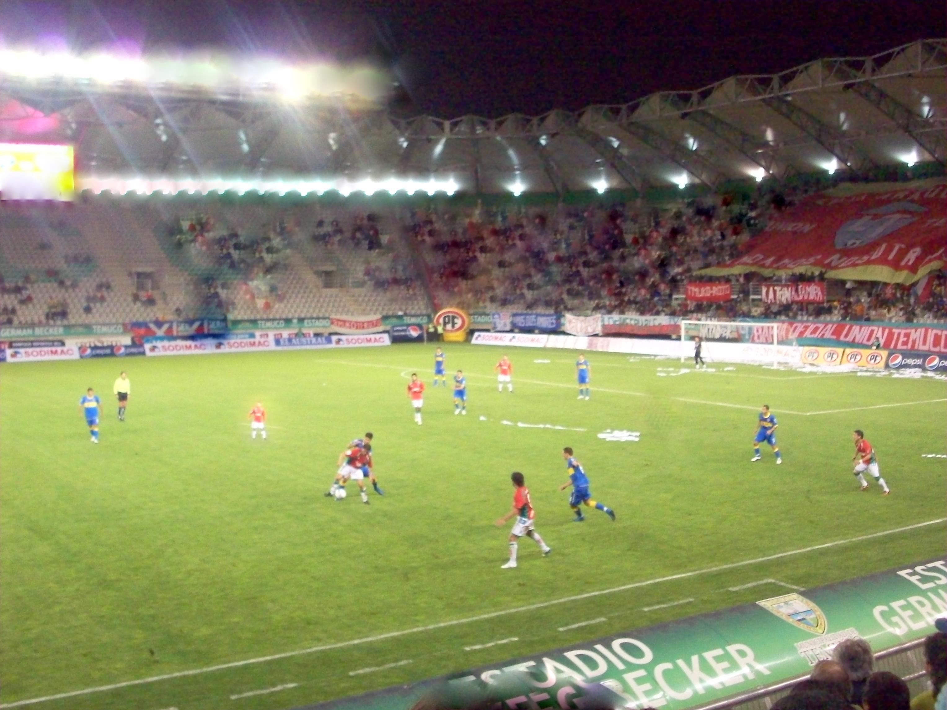 Unión Temuco recibiendo a Boca Juniors en un amistoso disputado en el Estadio Germán Becker. Los 'xeneizes' presentaron una formación con juveniles.